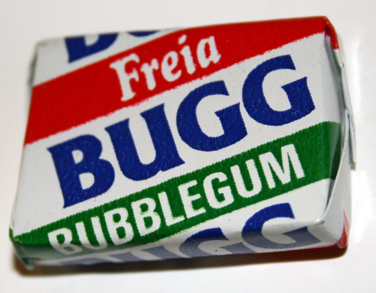 Den originale Bugg fra 1978